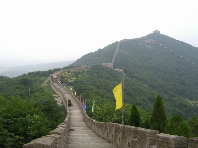 珍珠泉 南京長城 2004年6月17日撮影 撮影者：権作 参照